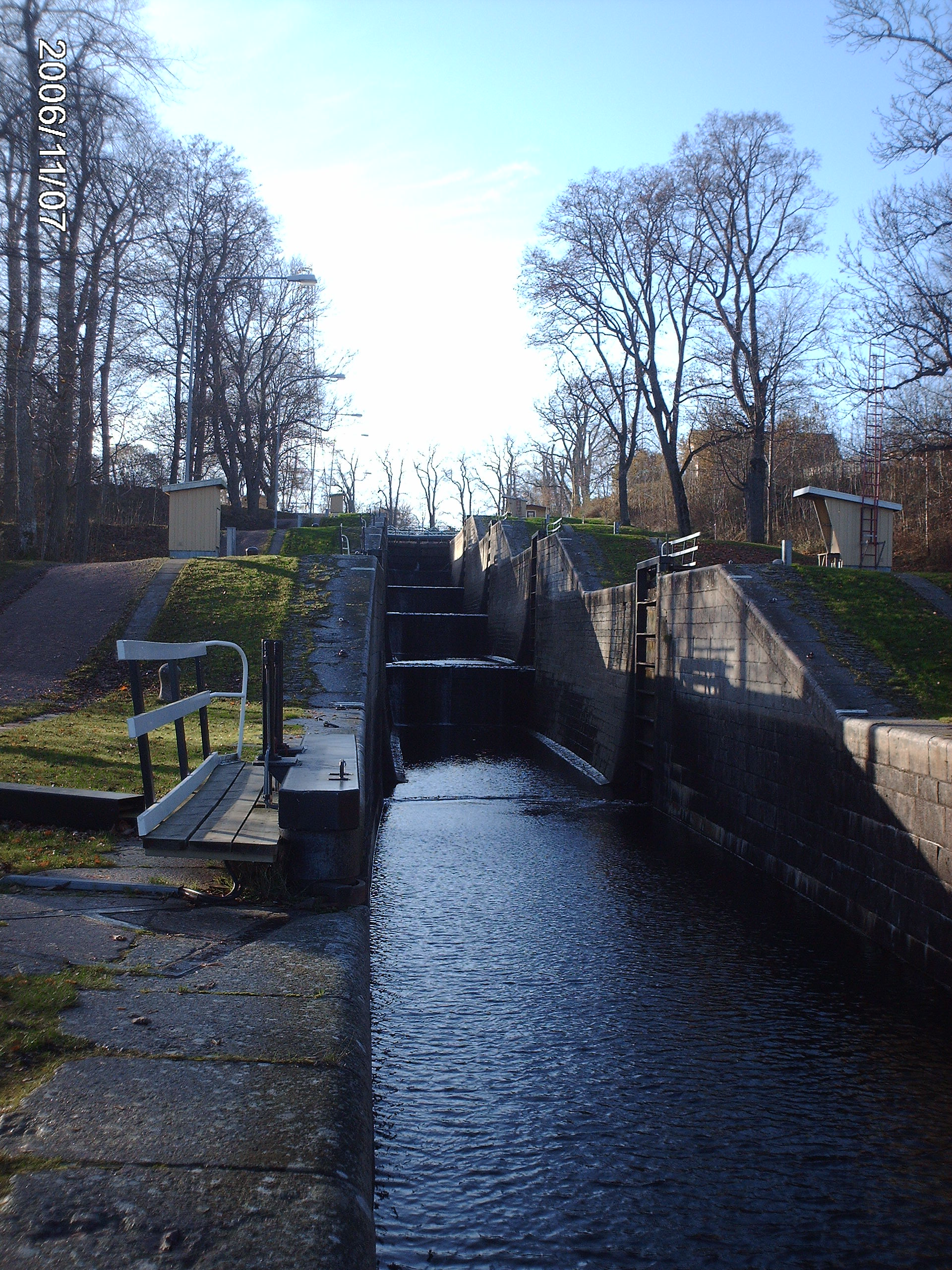 Borenshults slussar, Göta kanal, Östergötland.